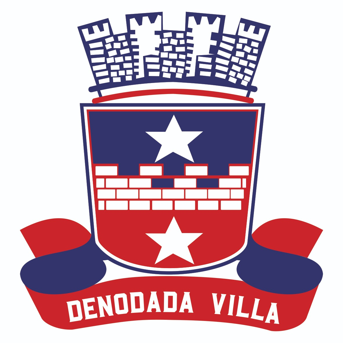 Brasão do Município de Itaparica na Bahia